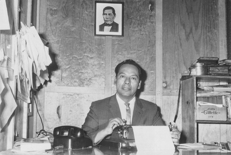 Néstor Sánchez trabajando en su despacho del periódico Carteles del Sur